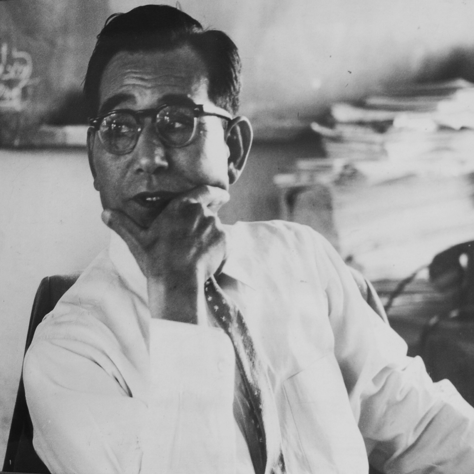 １９６０年代、立法院議員時代。